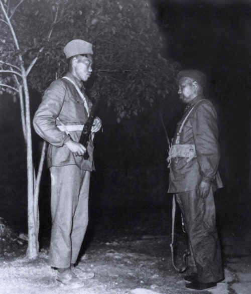 1958年,许世友下连队当兵。图为他和战士换岗、露餐、训练时的情景